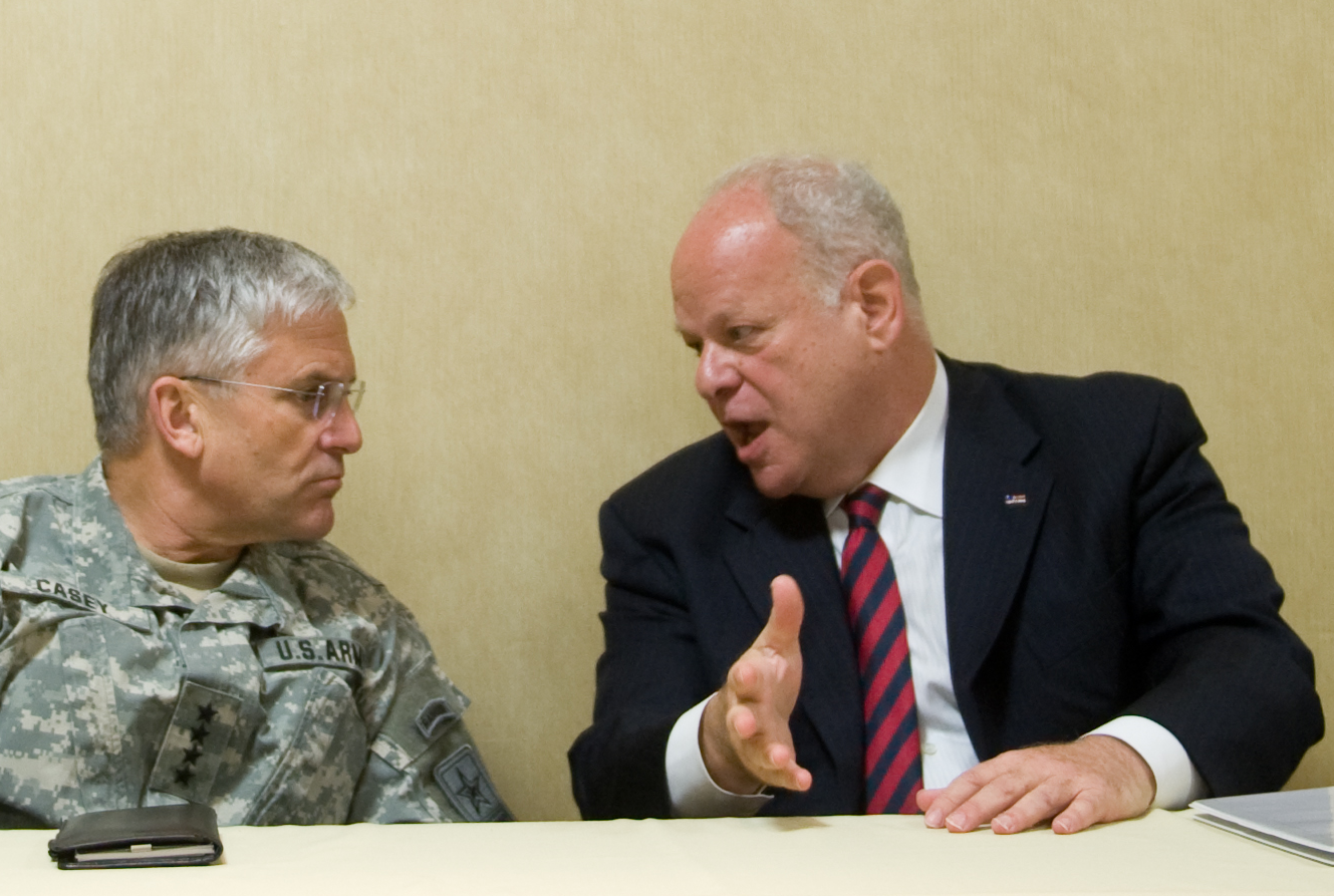 Chief of Staff of the Army, Gen. George W. Casey Jr., talks with Dr. Martin Seligman of the University of Pennsylvania. Thirty-two Army Soldiers and civilians attended a five-day Master Resilience Training course at the university as part of Comprehensive Soldier Fitness (fragment)